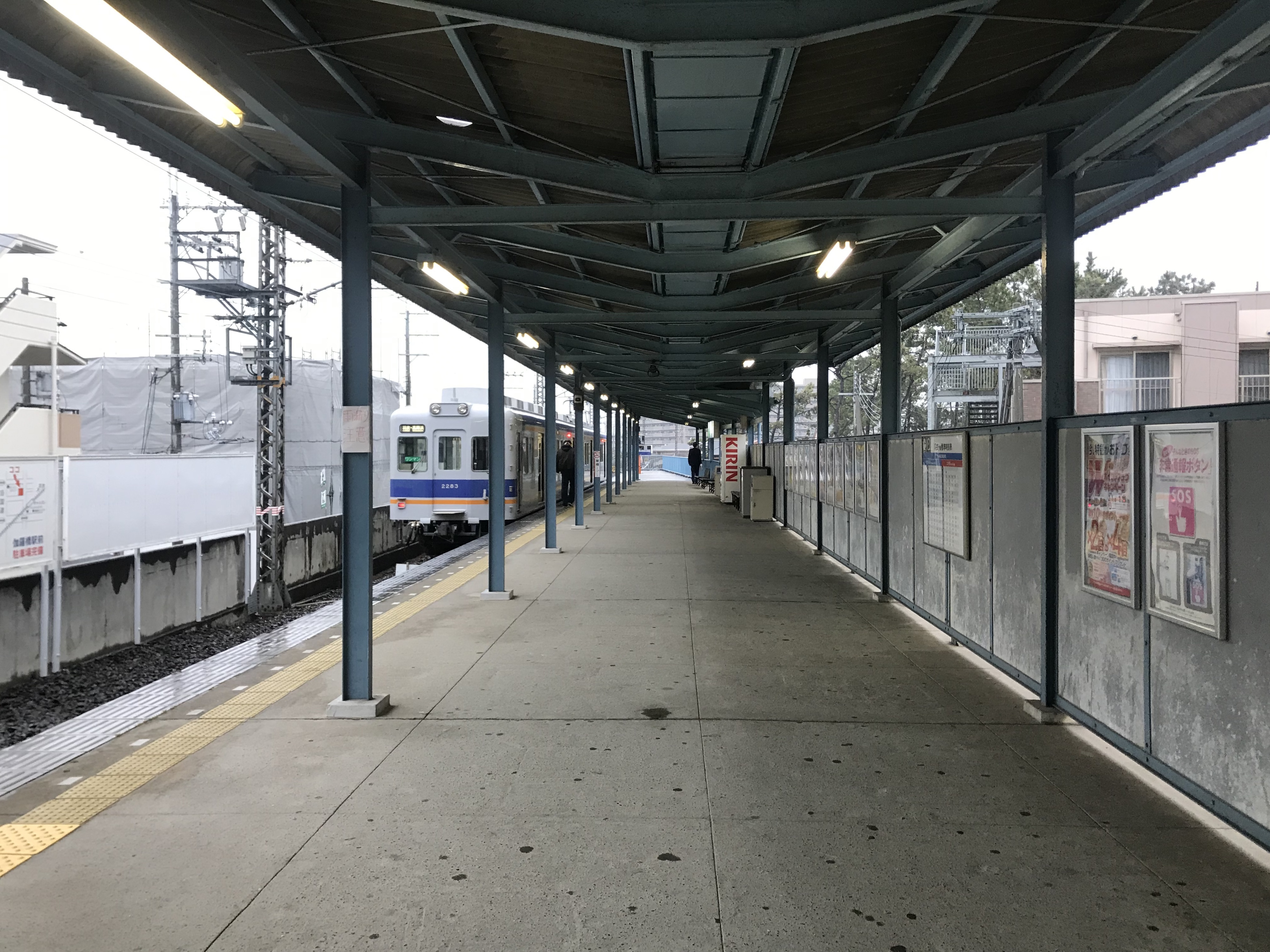 高師浜駅のホーム(奥は伽羅橋方面)